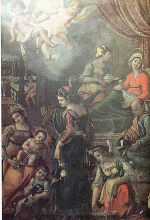 San giorgio a Castelnuovo, Cosimo Lotti, Natività di Maria (1602)